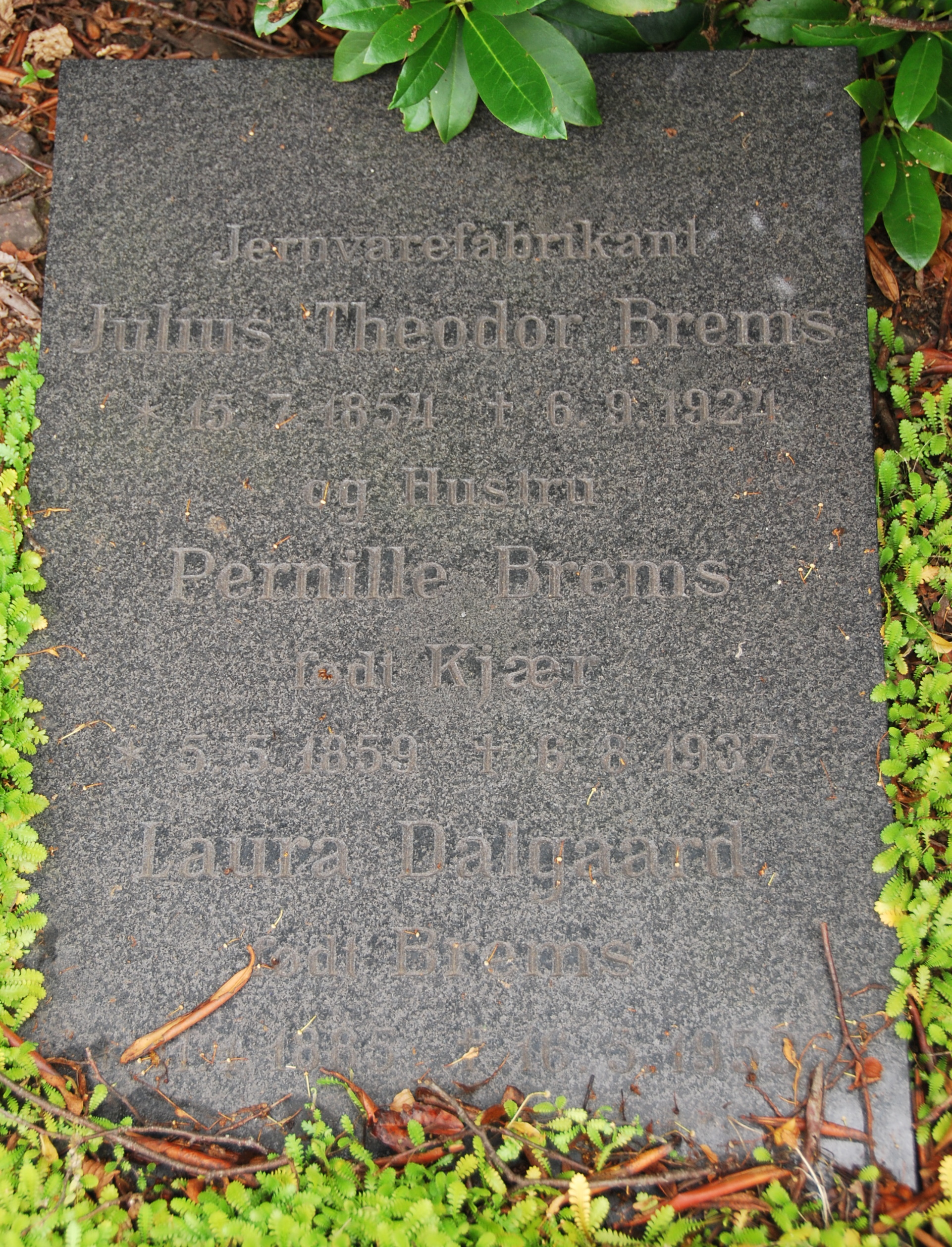 Gravsten for fabrikant Julius Theodor Brems (1854-1924), hustru Pernille og datteren Laura. Placeret på Viborg Kirkegård.